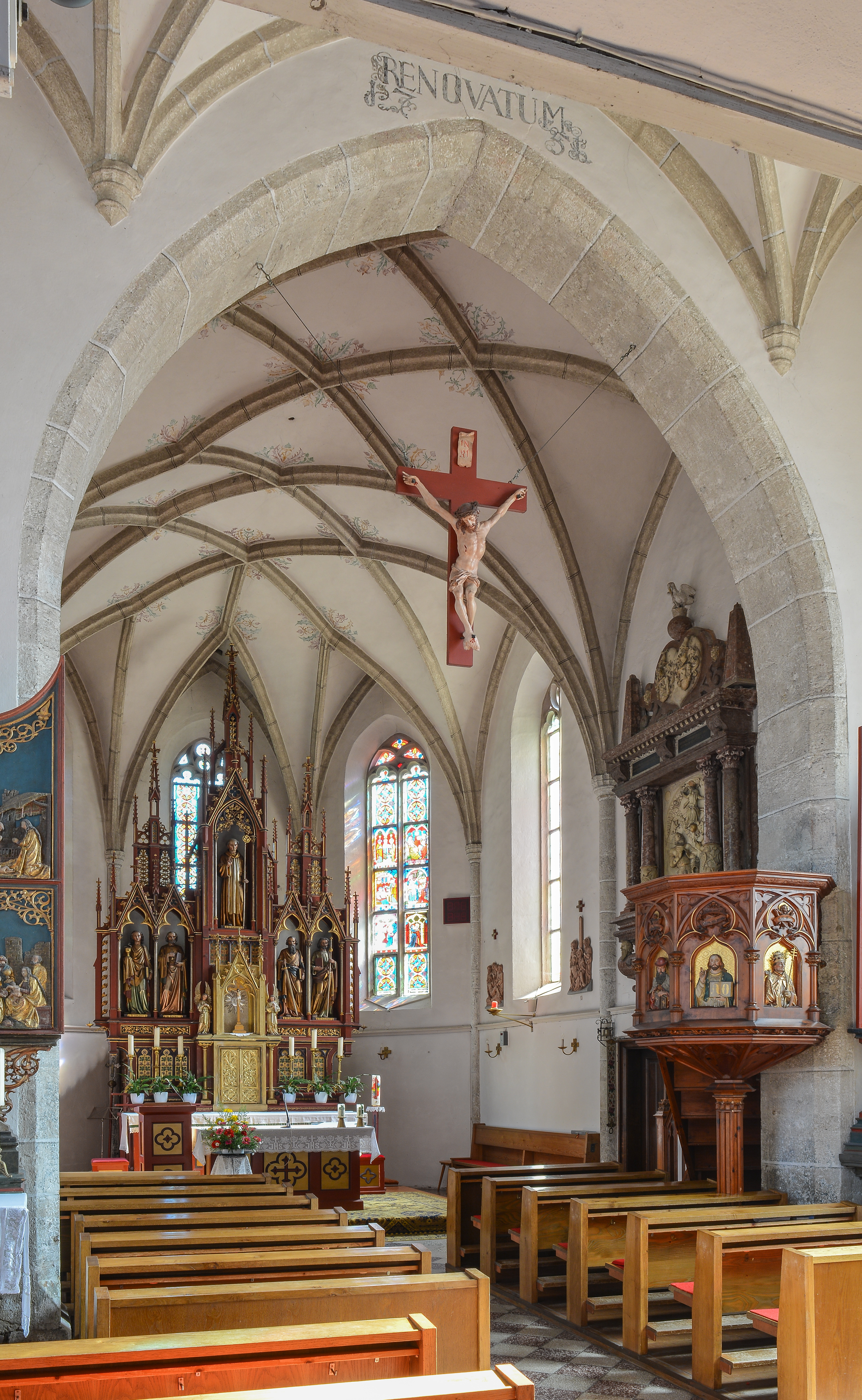 Kath. Pfarrkirche hl. Gallus mit Friedhof und Aufbahrungshalle Der netzrippengewölbte Chor der spätgotischen Pfarrkirche von Schleißheim ist gegenüber dem Langhaus eingezogen und hat ein Netzrippengewölbe. Der Hochaltar und die Kanzel sind neugotische Arbeiten.